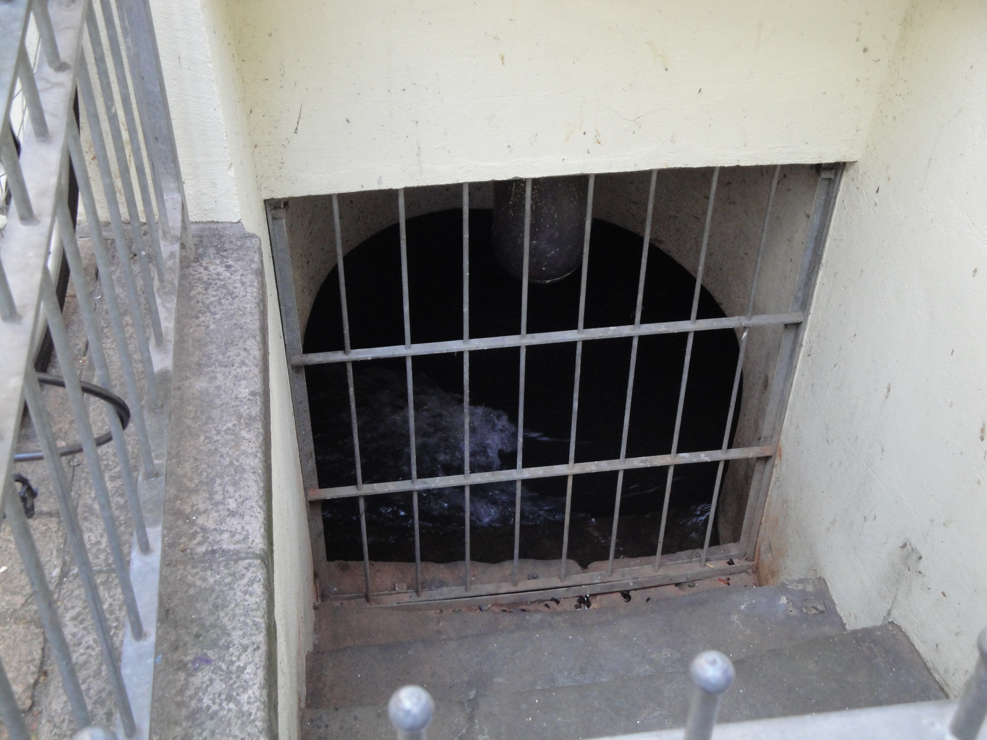 Gießhübelbach in Speyer